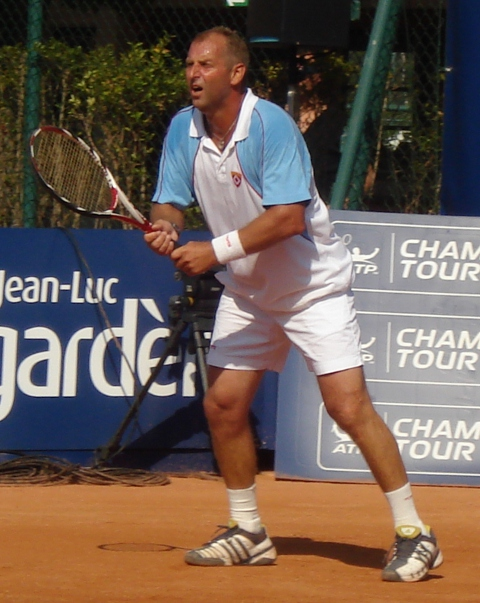 Thomas Muster lors du Trophée Jean-Luc Lagardère 2009